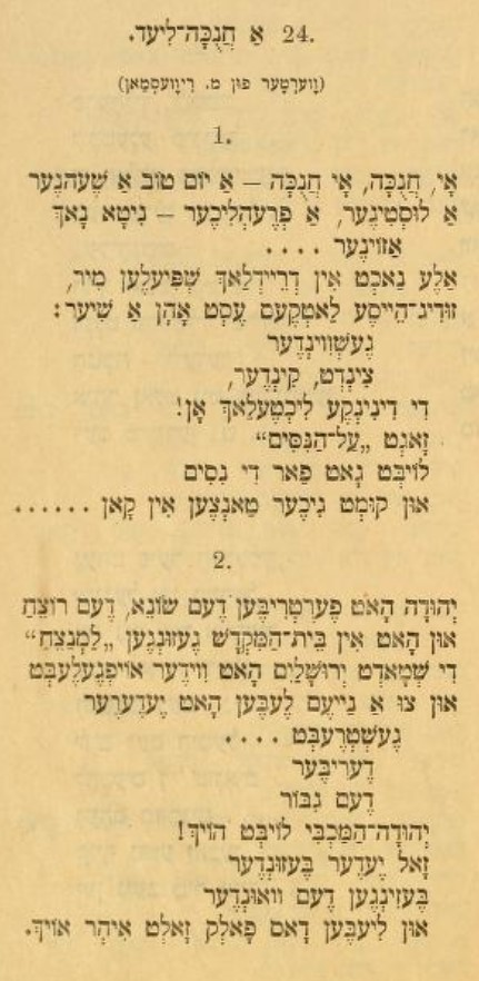 הפרסום הראשון של שירו של מרדכי ריווסמן "חנוכּה, אוי חנוכּה" (בקובץ לידער-זאַמעלבוך, 1912)